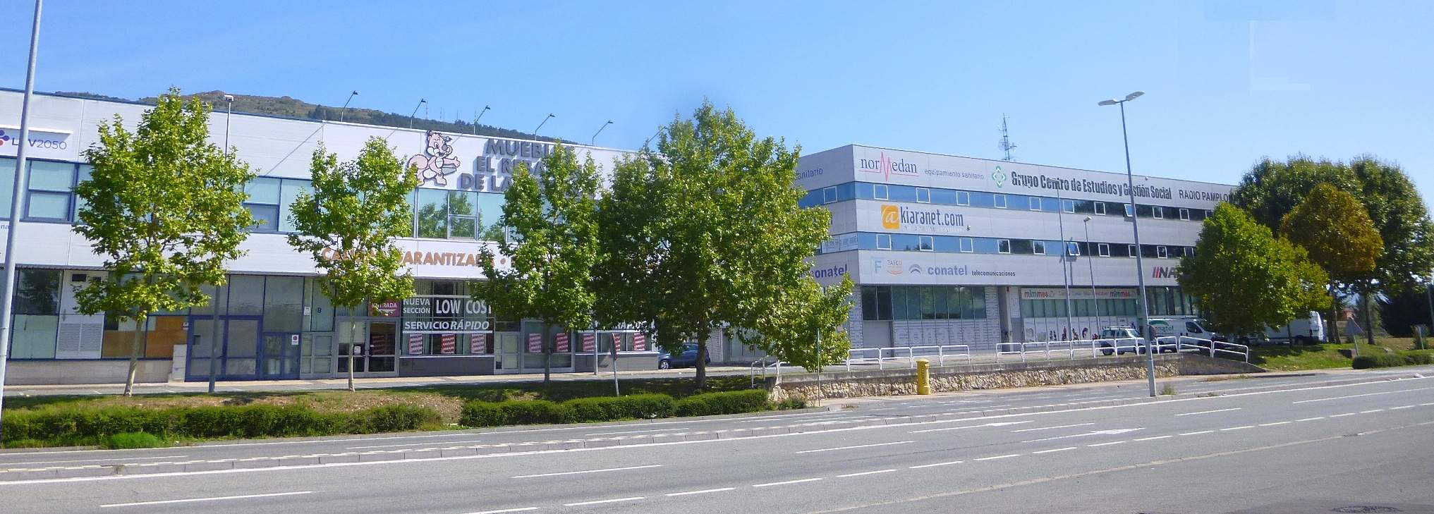 Polígono Industrial Plazaola (Aizoáin, Berrioplano, Navarra)